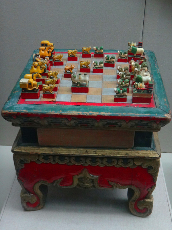 蒙古象棋，由User:Baomi拍摄于内蒙古博物馆